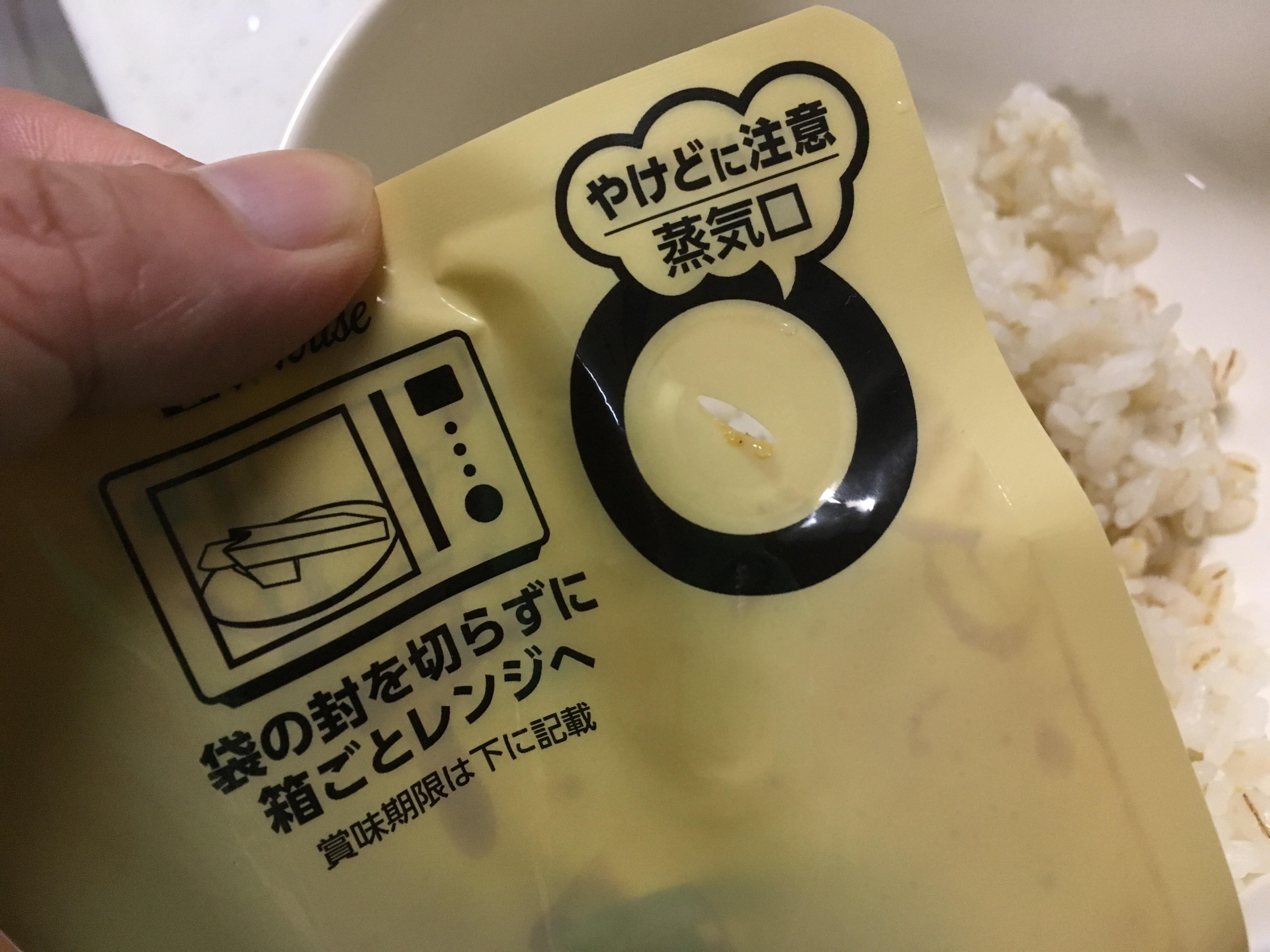 最近のククレカレーはそのままレンチンできる！